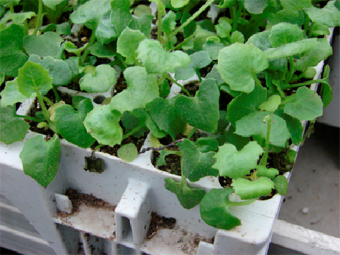 keleti zergevirág a zsohárkertészetben